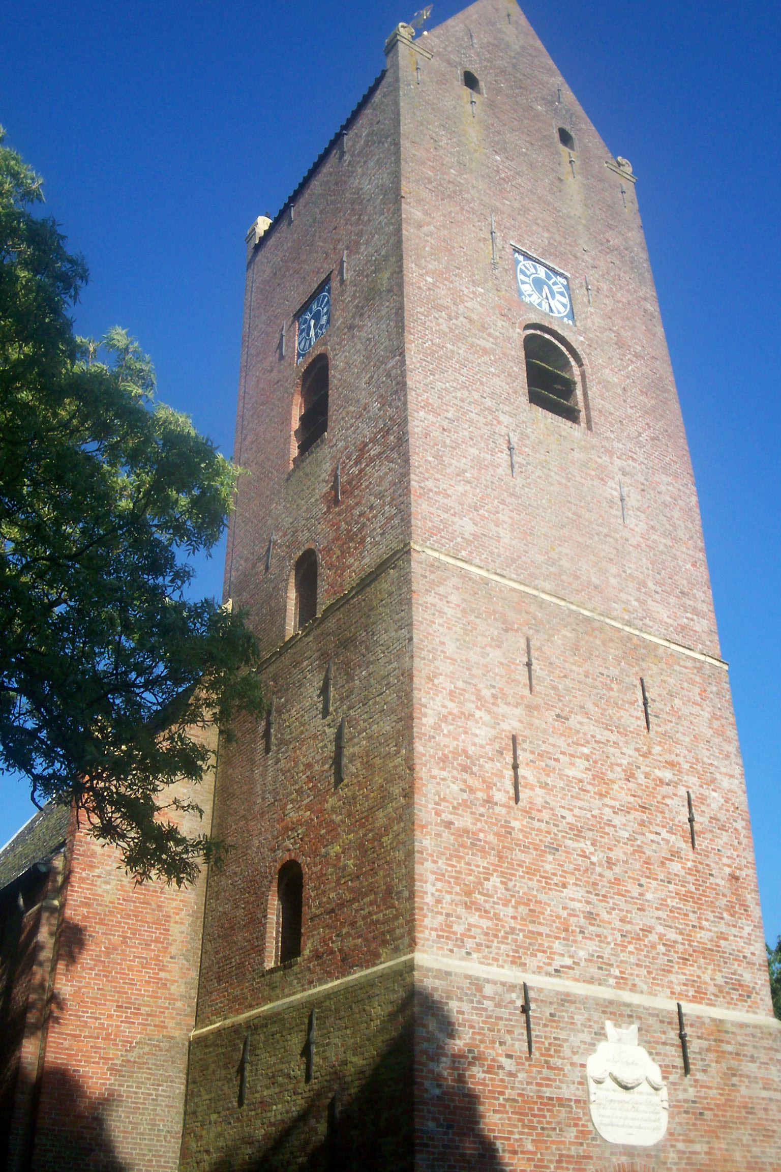 De tsjerke fan Garnwerd (2006)